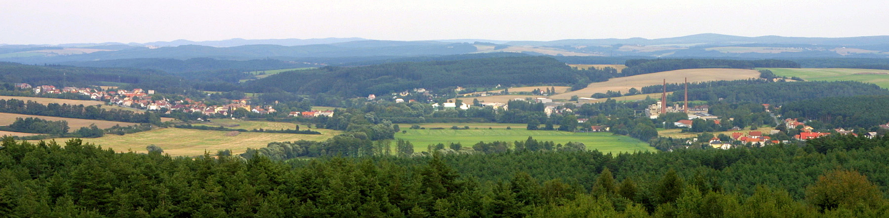 Město Třemošná od západu.